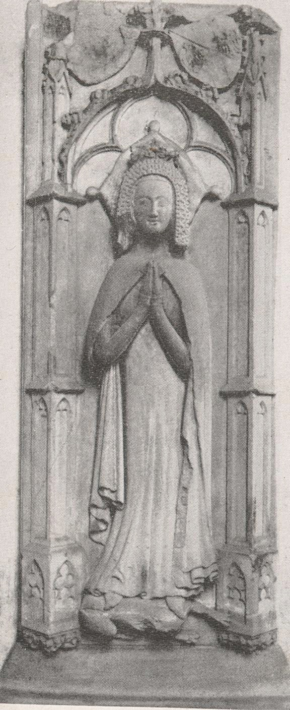 Epitaph Pfalzgräfin Margarete von Sizilien-Aragon, Stiftskirche Neustadt